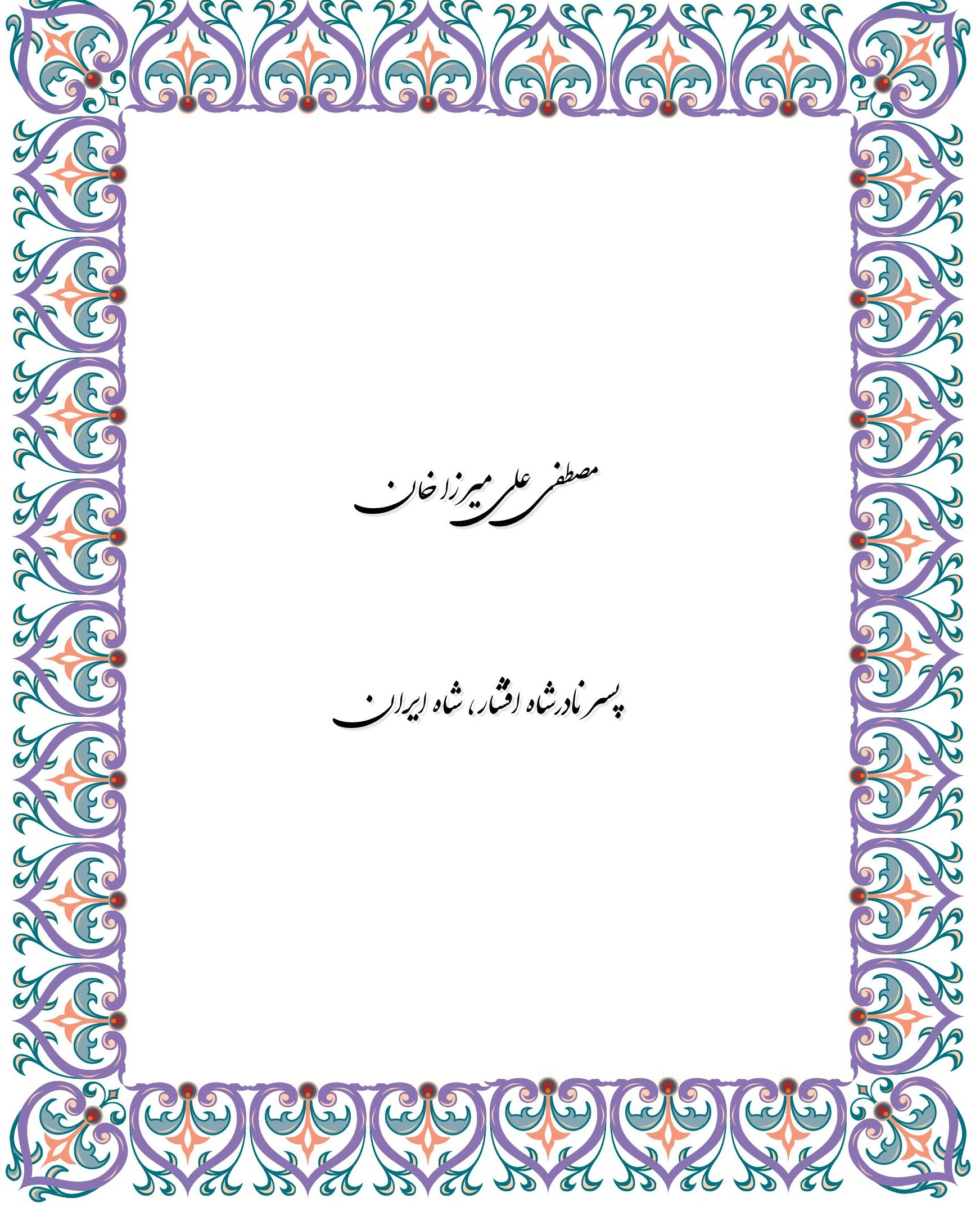 مصطفی علی میرزا خان